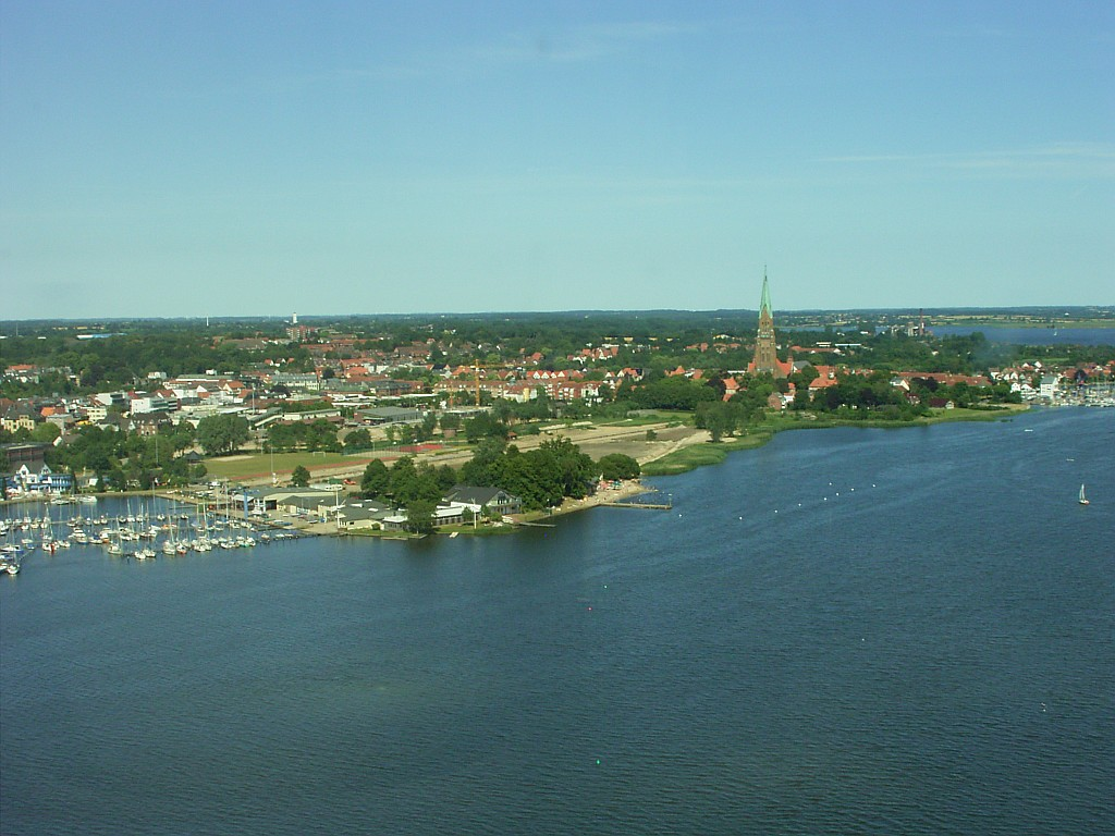 Blick aus dem Wiking-Turm auf das nordwestliche Schleswig mit dem Schleswiger Dom.